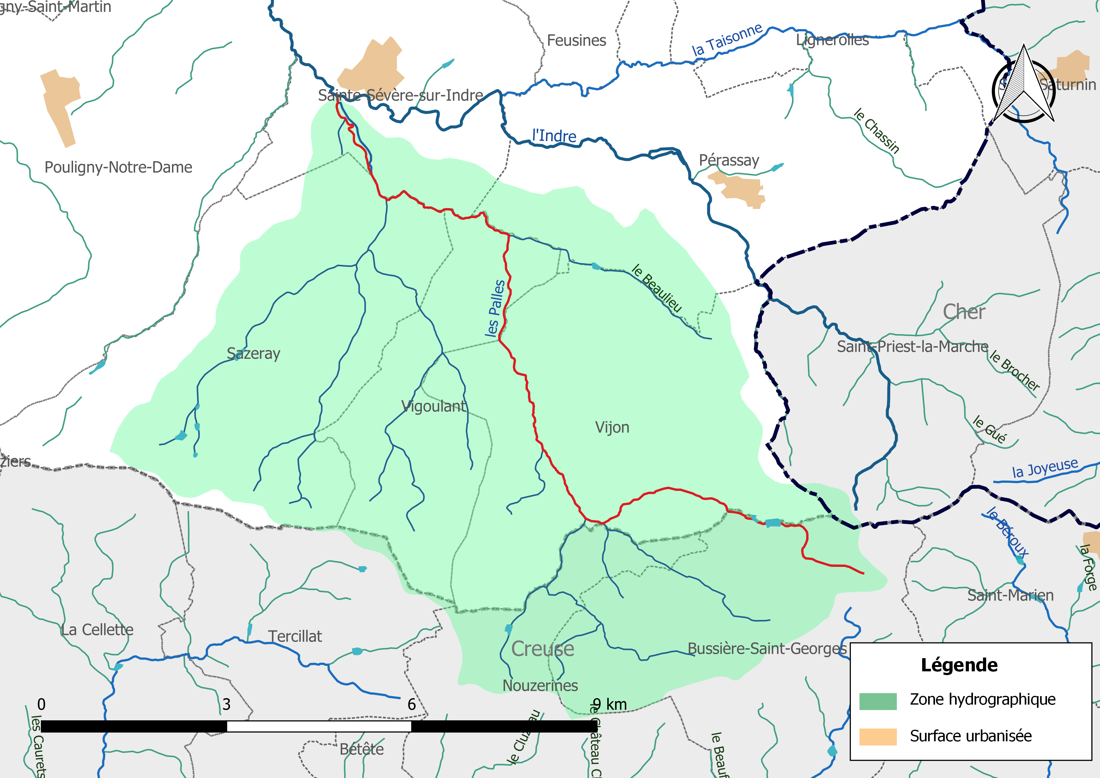 Carte du cours d'eau « Les Palles » (France) et de la zone hydrographique dans laquelle il s'insère.